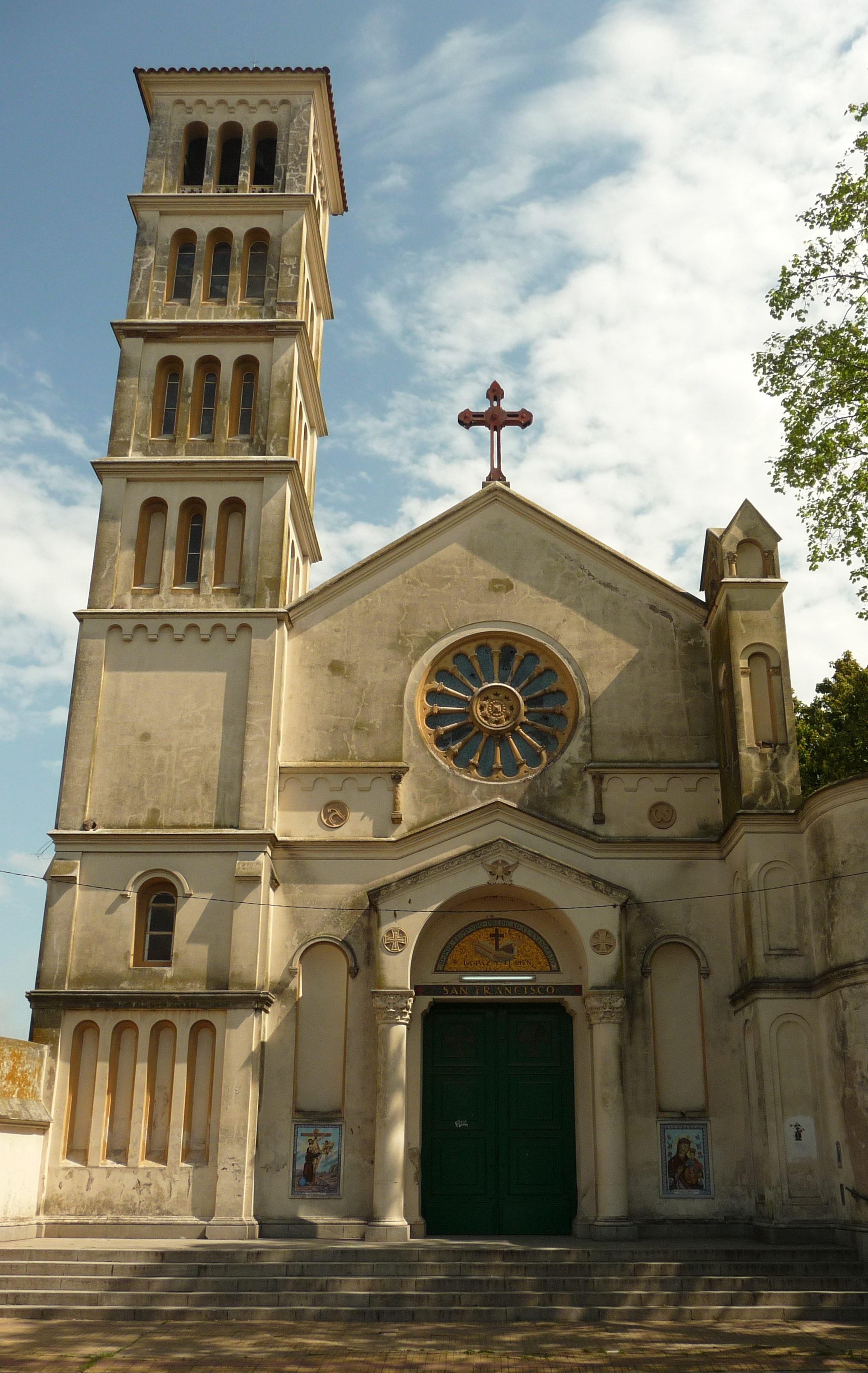 Templo de San Francisco de Asís